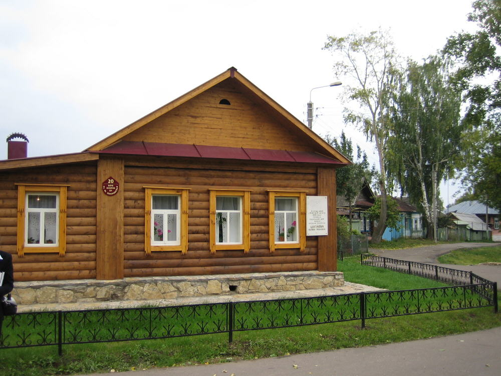 дом, где жила Цветаева (09.09.05)